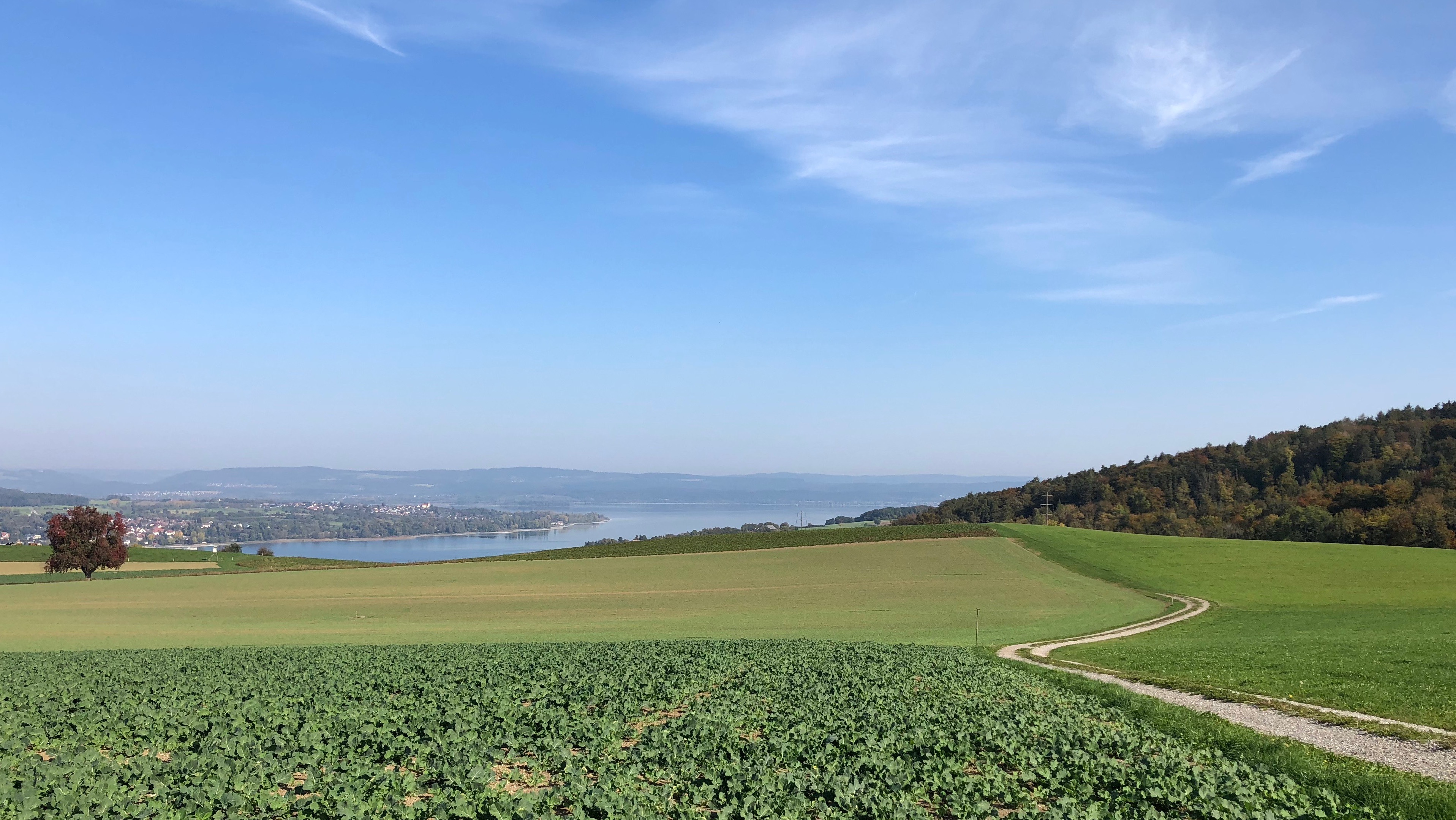 Seerücken von Südwesten.